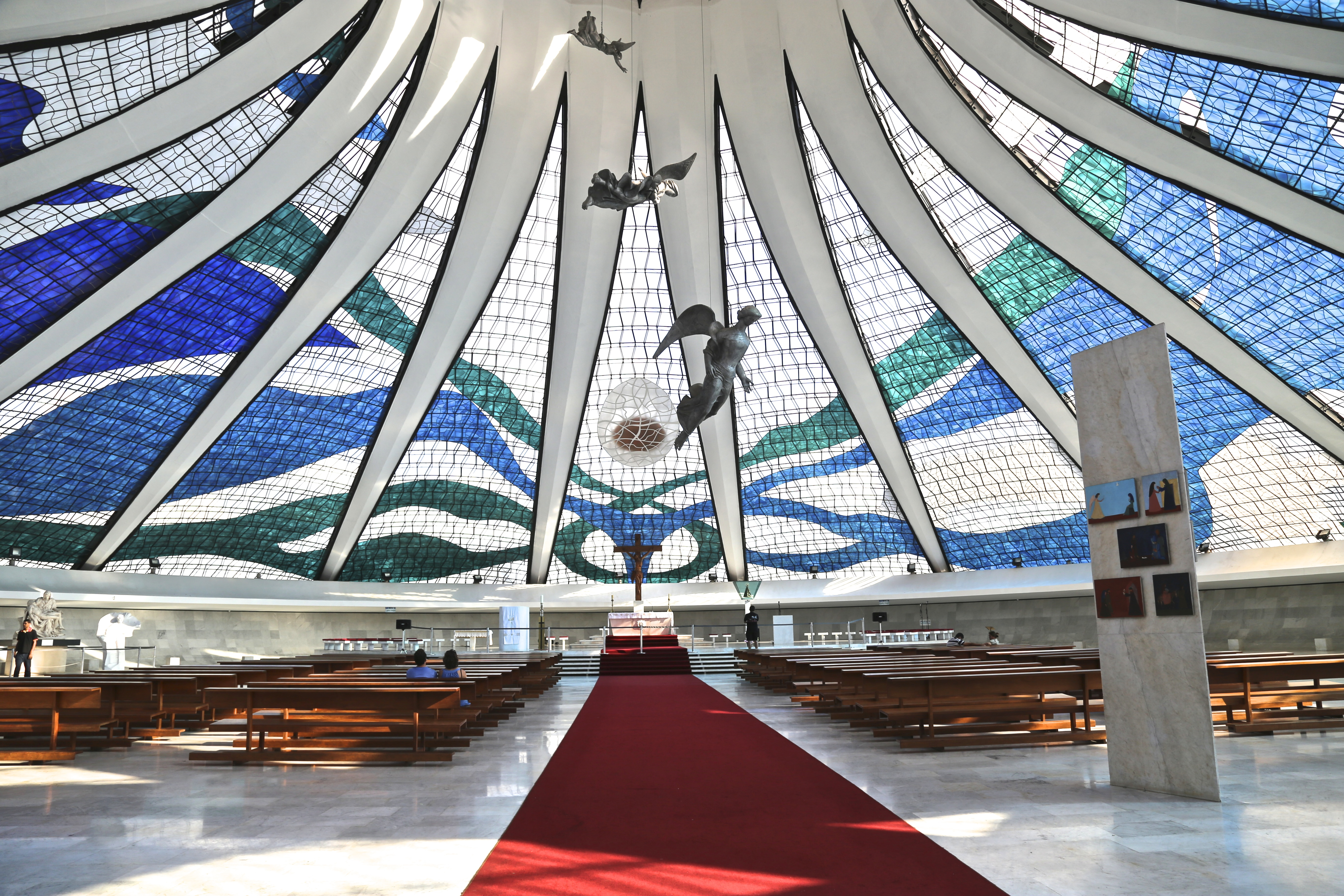 O projeto é do arquiteto Oscar Niemeyer, a Catedral foi o primeiro monumento a ser criado em Brasília. Sua pedra fundamental foi lançada em 12 de setembro de 1958. A estrutura ficou pronta em 1960, onde apareciam somente a área circular de setenta metros de diâmetro, da qual se elevam dezesseis colunas de concreto (pilares de secção parabólica) num formato hiperboloide, que pesam noventa toneladas.